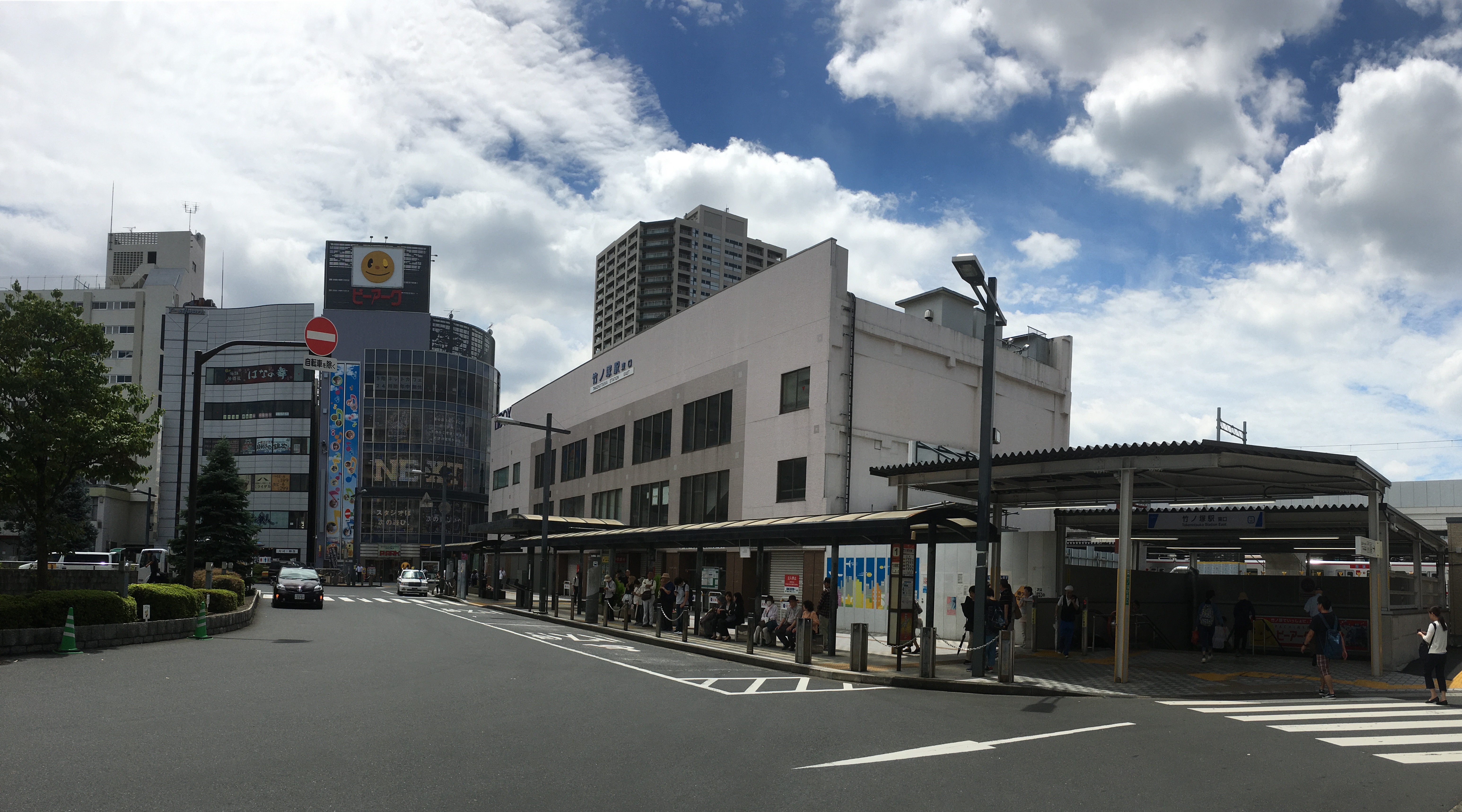 竹ノ塚駅 (Takenotsuka Station)